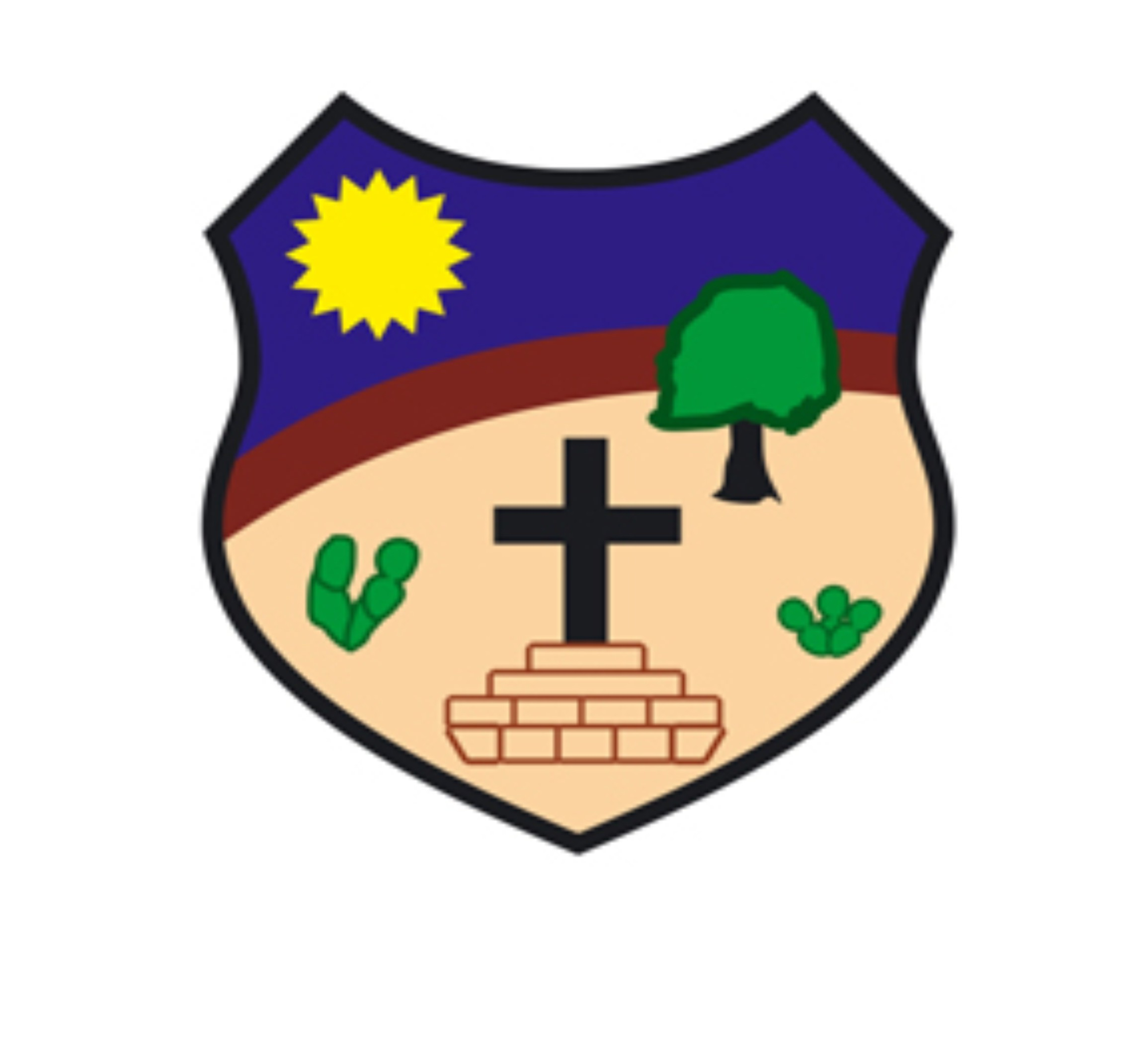 Brasão de Santa Cruz do capibaribe-PE